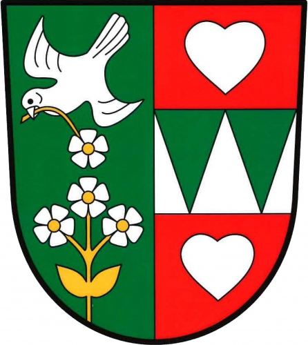 znak, Kolešov, okres Rakovník